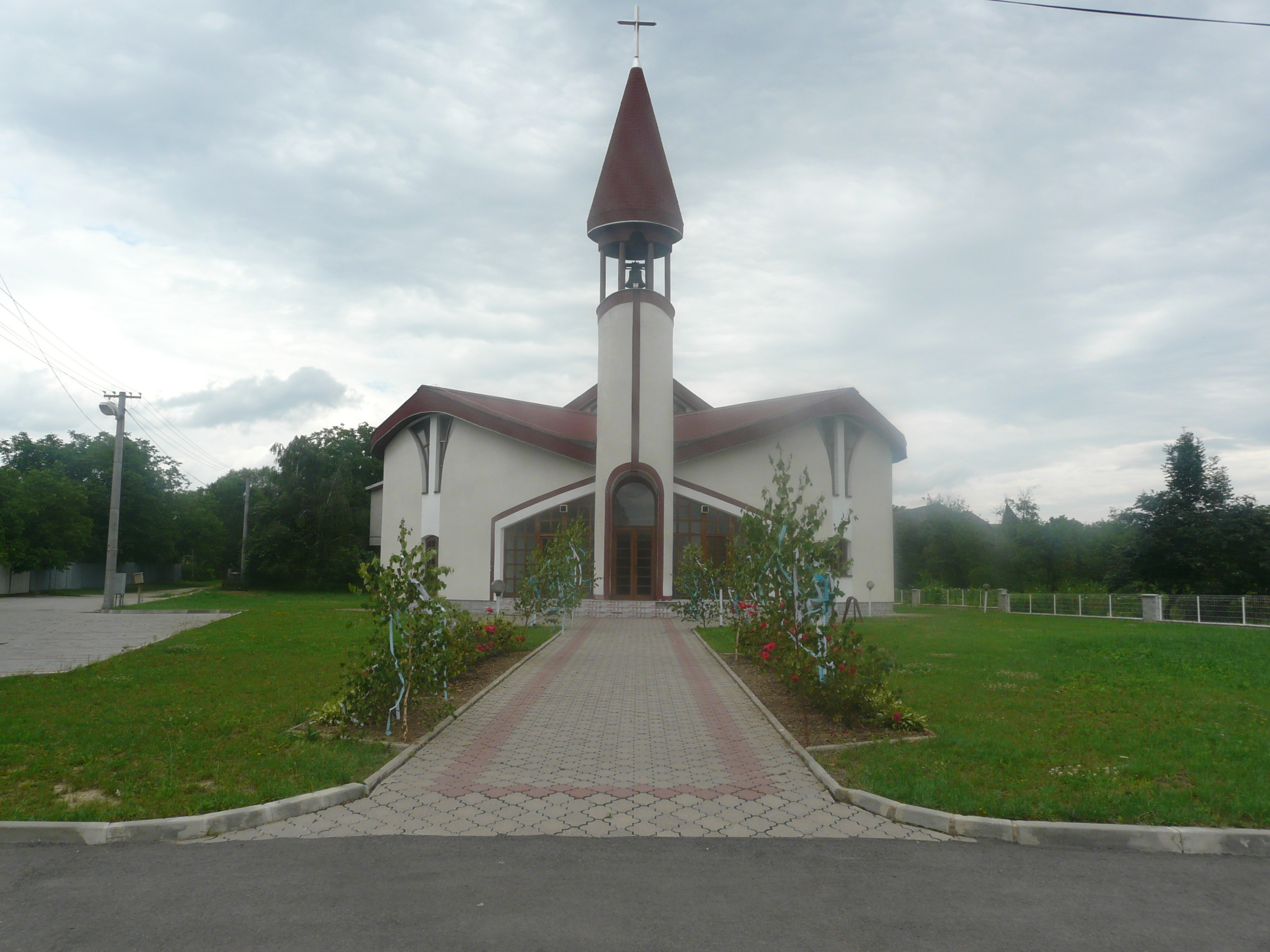 Rímskokatolícky kostol Najsvätejšieho Srdca Ježišovho v Poši.